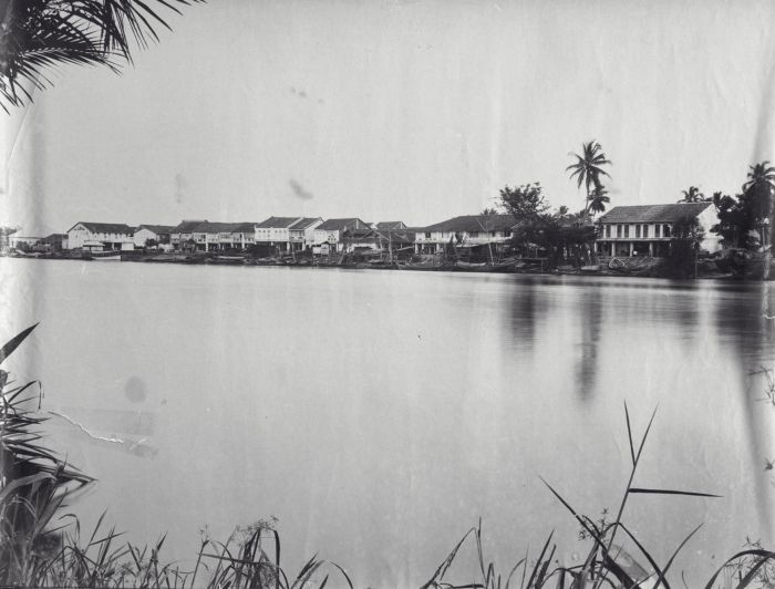 Foto. Tandjoengbalei, 1895